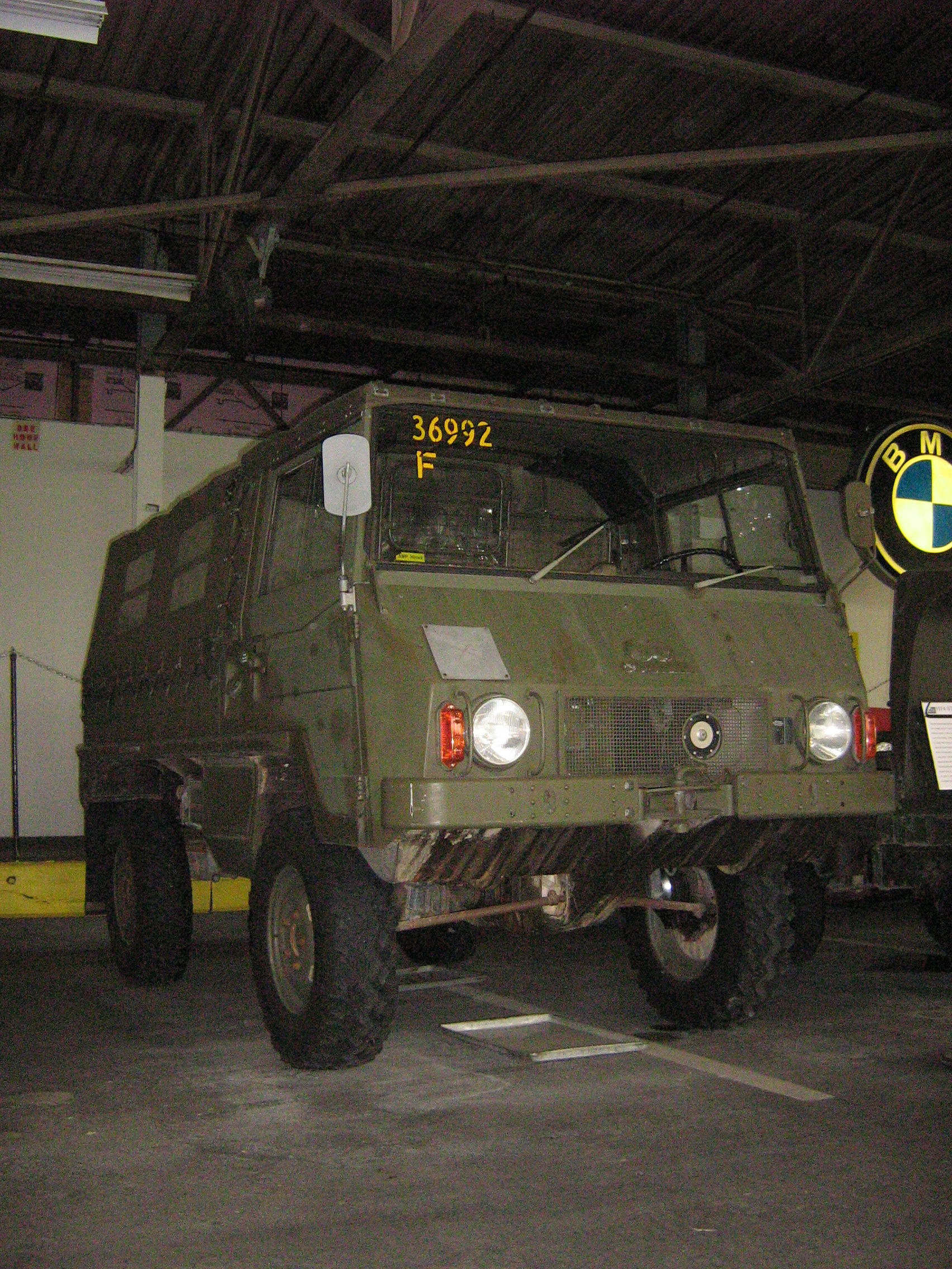 1974 Steyr Puch Pinzgauer